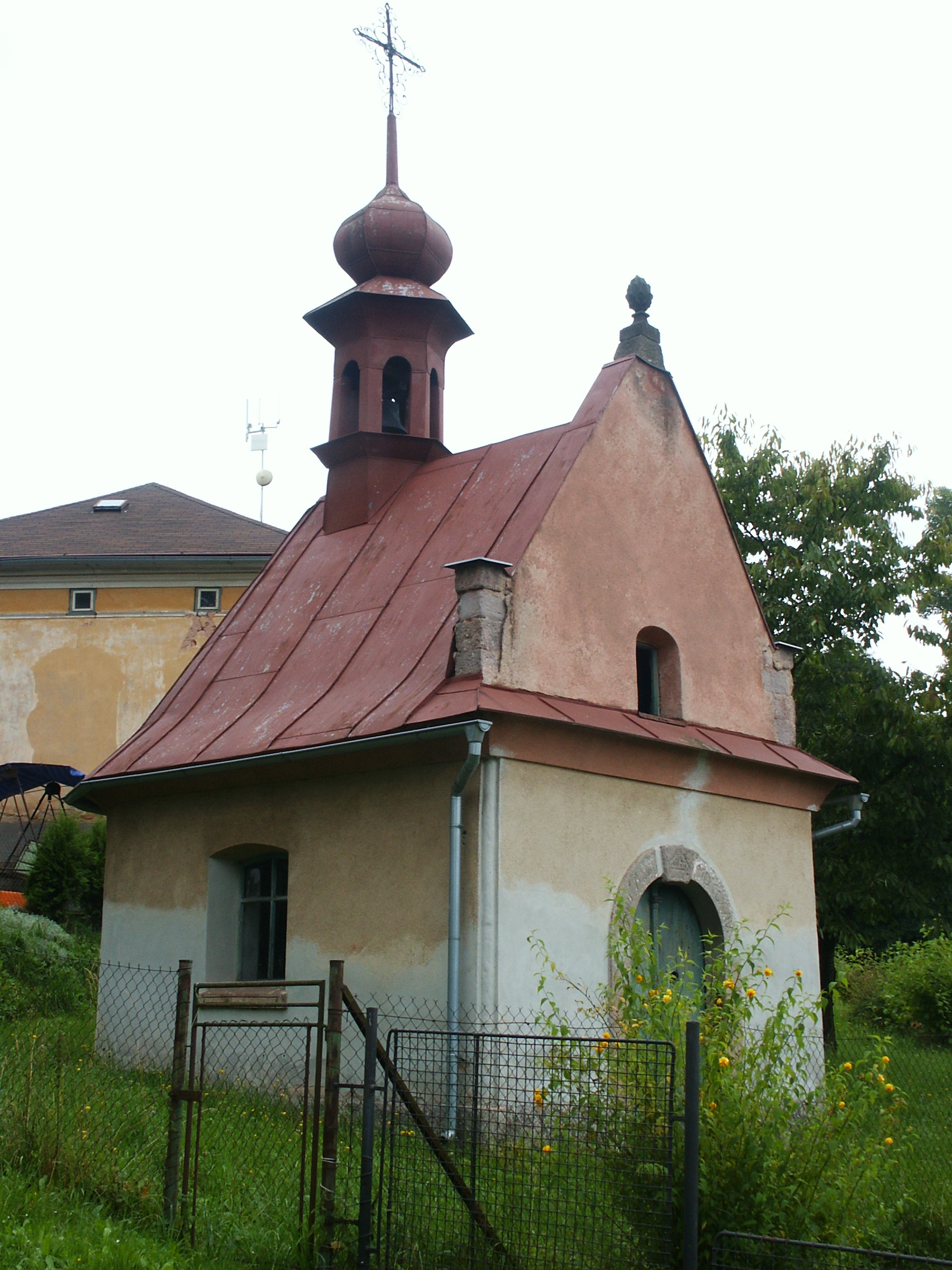 Radkyně - kaplička